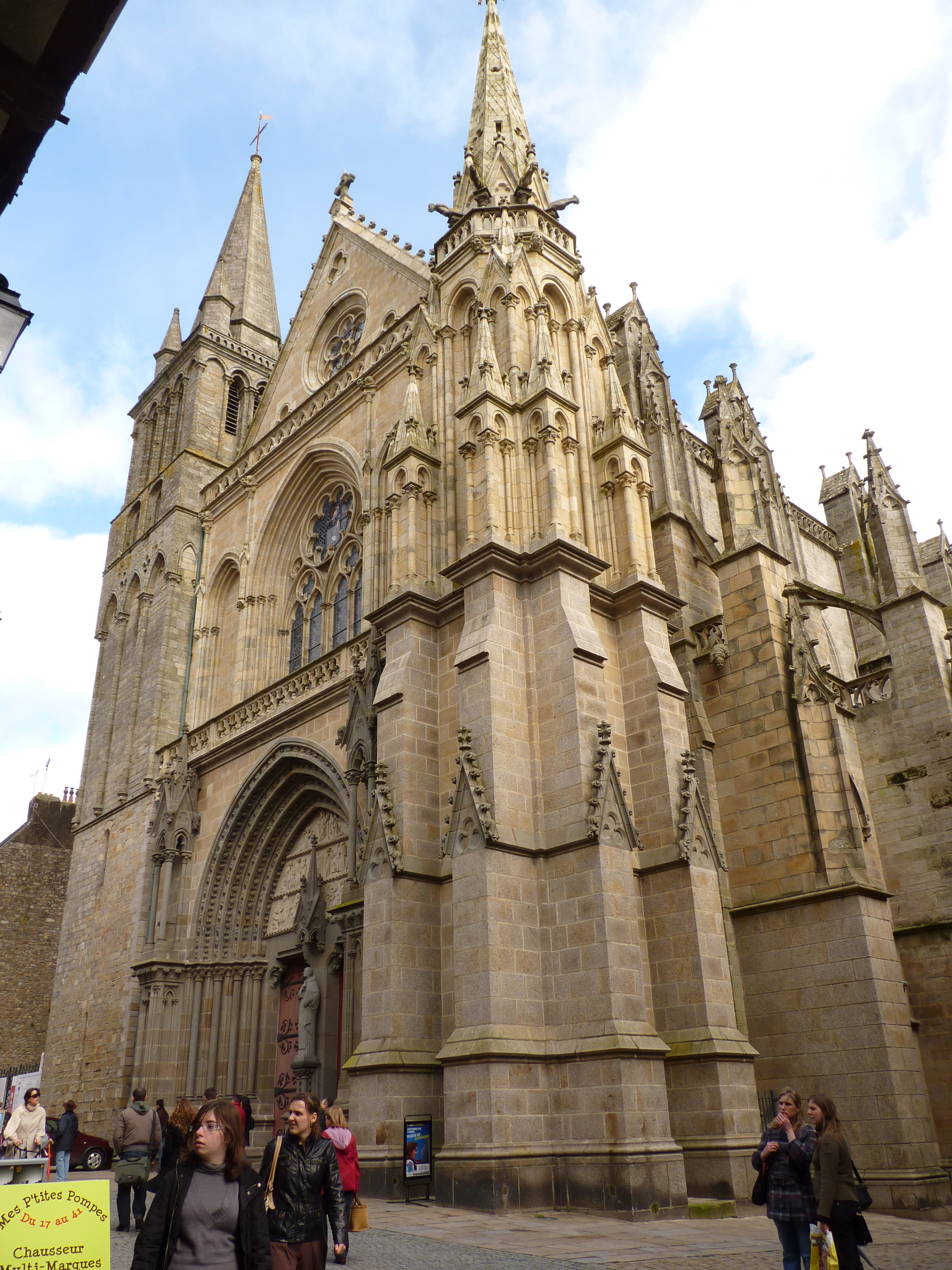 Cathédrale Saint-Pierre